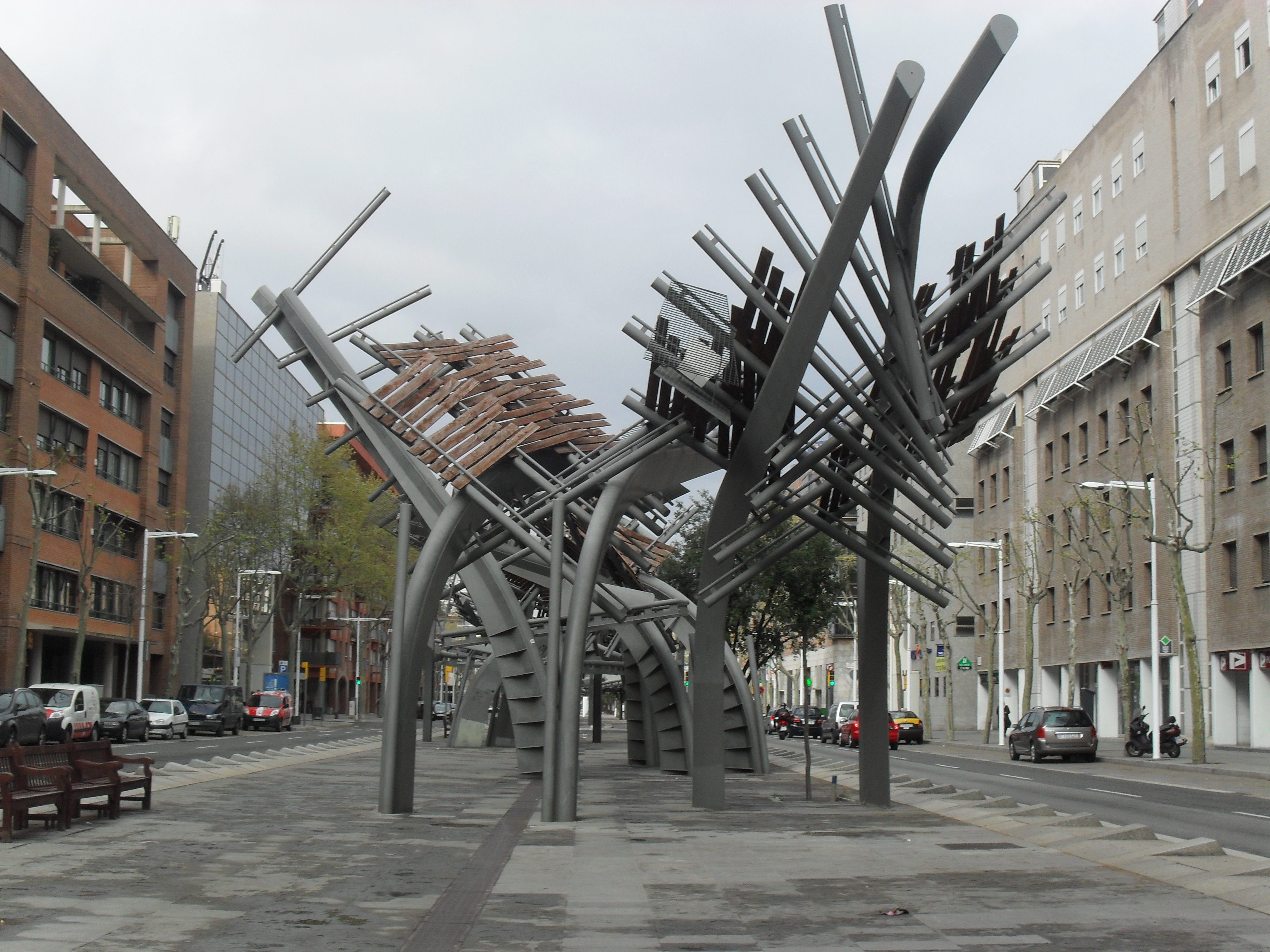 poble nou-barcelona